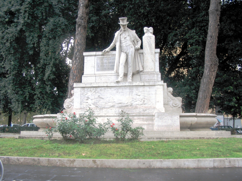 Michele Tripisciano (Caltanisetta 1860-1913), Monument to poet Giuseppe Gioachino Belli, Rome (1913).